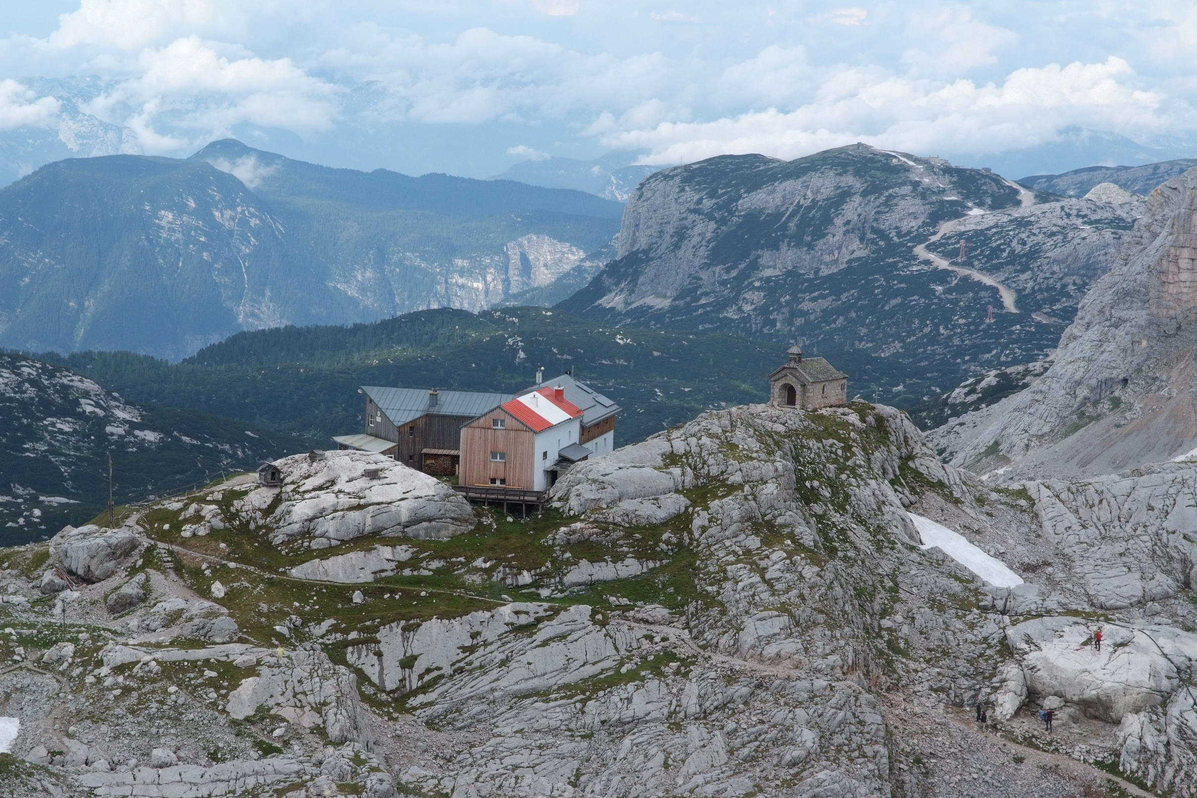 Simonyhütte